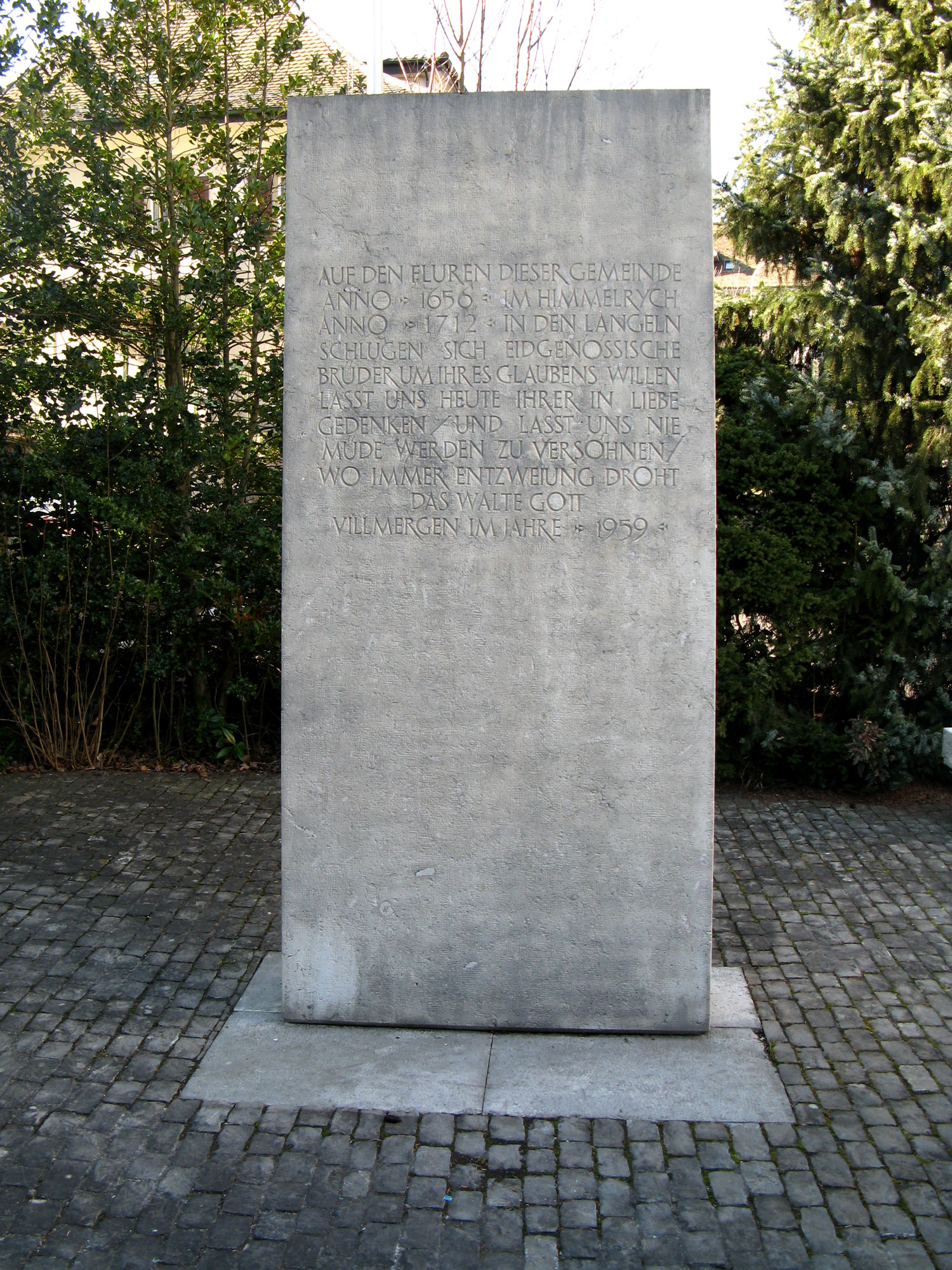 Denkmal zur Erinnerung an die Schlachten von Villmergen 1656 und 1712. Die Inschrift lautet: "Auf den Fluren dieser Gemeinde anno 1656 im Himmelrych und anno 1712 in den Langeln schlugen sich eidgenössische Brüder um ihres Glaubens willen. Lasst uns heute ihrer in Liebe gedenken und lasst uns nie müde werden zu versöhnen, wo immer Entzweiung droht. Das walte Gott. Villmergen im Jahr 1959."